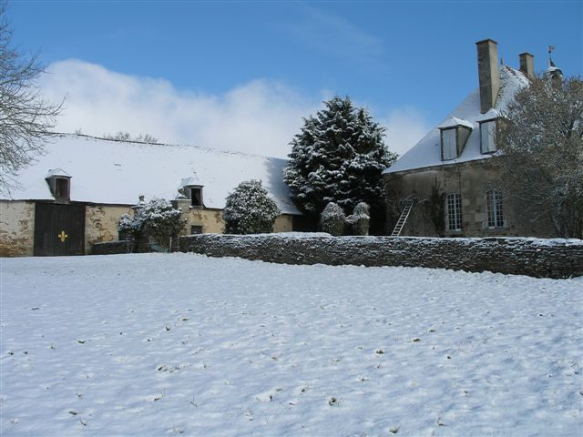 Domaine du Puy 407 m altitude